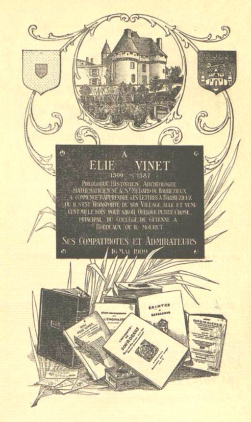 "A la Mémoire du Saintongeais Élie Vinet" de Gaston Chevrou (1910), p. 99.